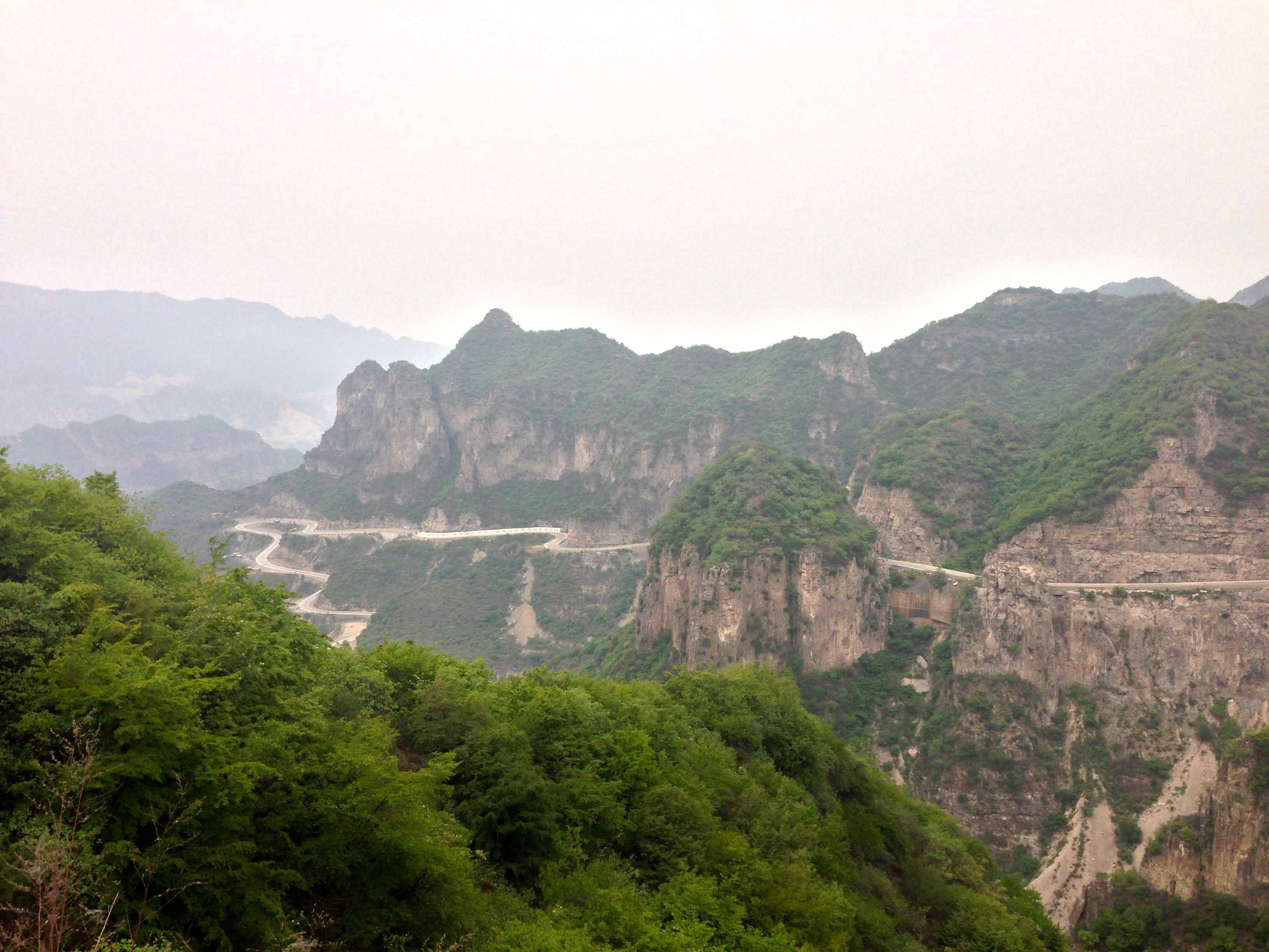 Yuxian, Yangquan, Shanxi, China